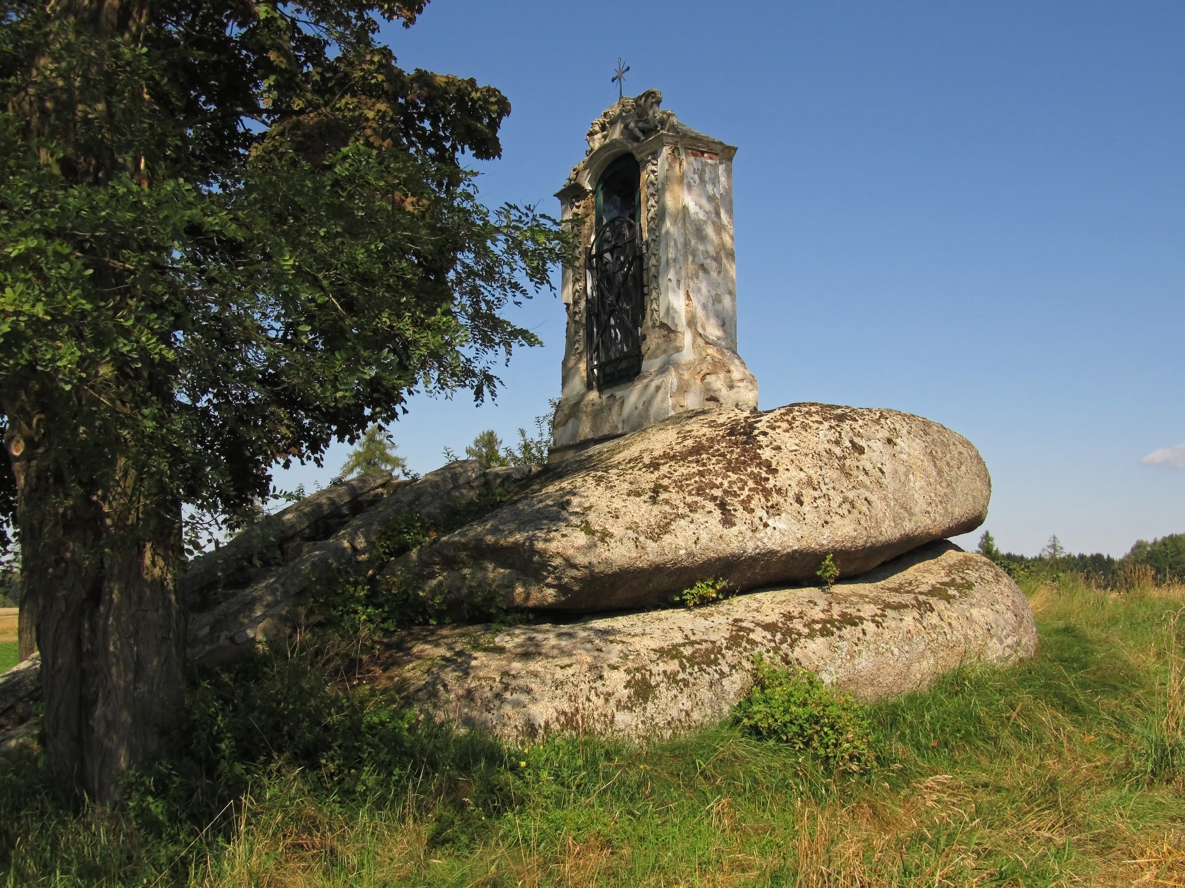 Der Kolomanistein bei Eisgarn in Niederösterreich ist ein mit einer Kapelle bebauter Schalenstein. This media shows the natural monument in Lower Austria with the ID GD-037.